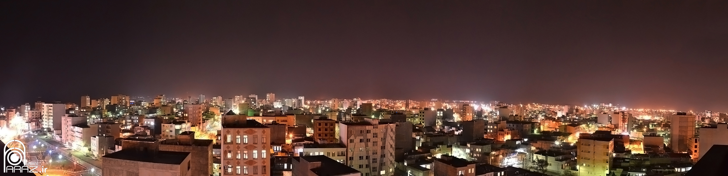 نمای شب